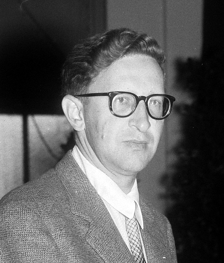 Василь Смислов 1954 року